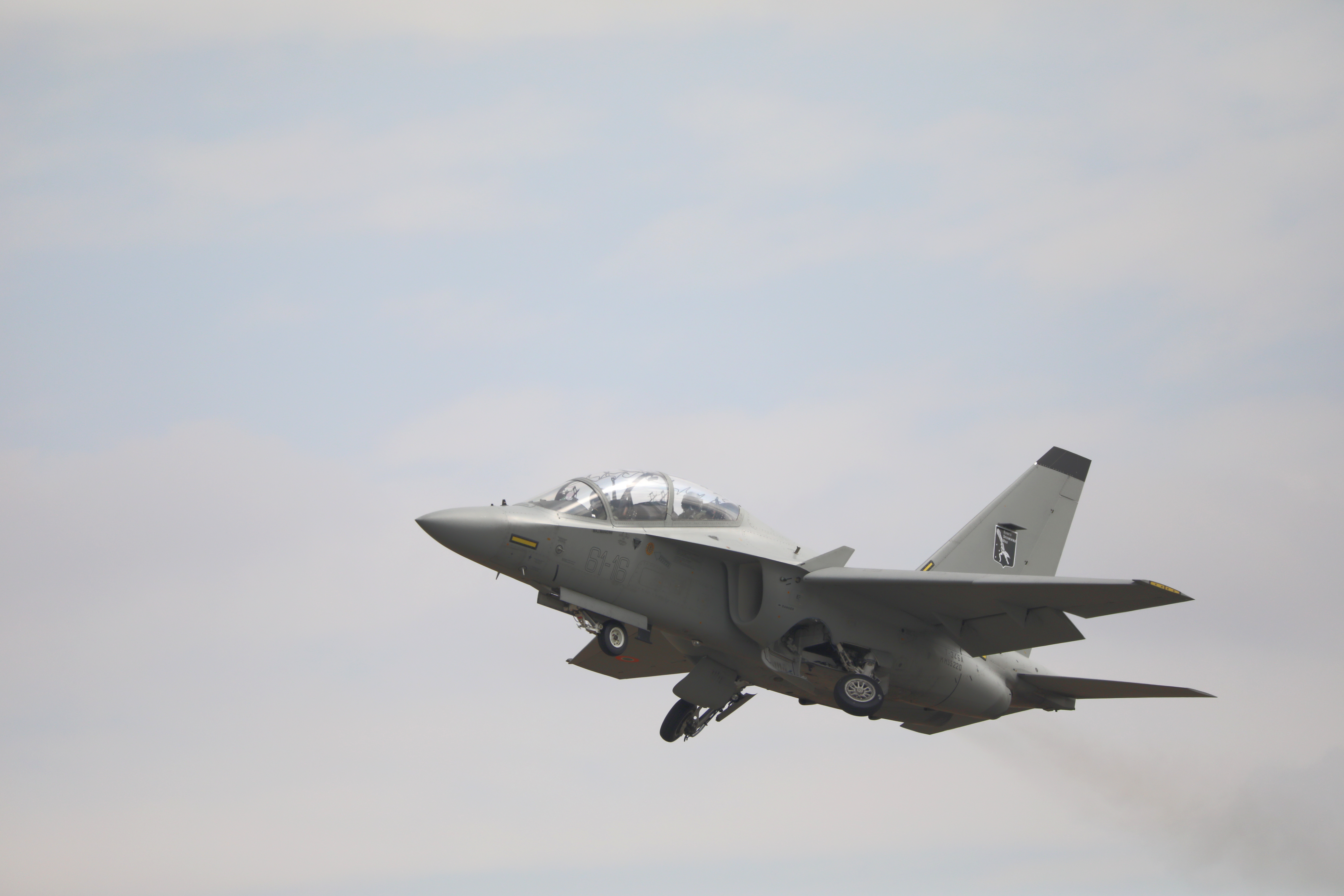 Aermacchi T-346A 5D4_1066